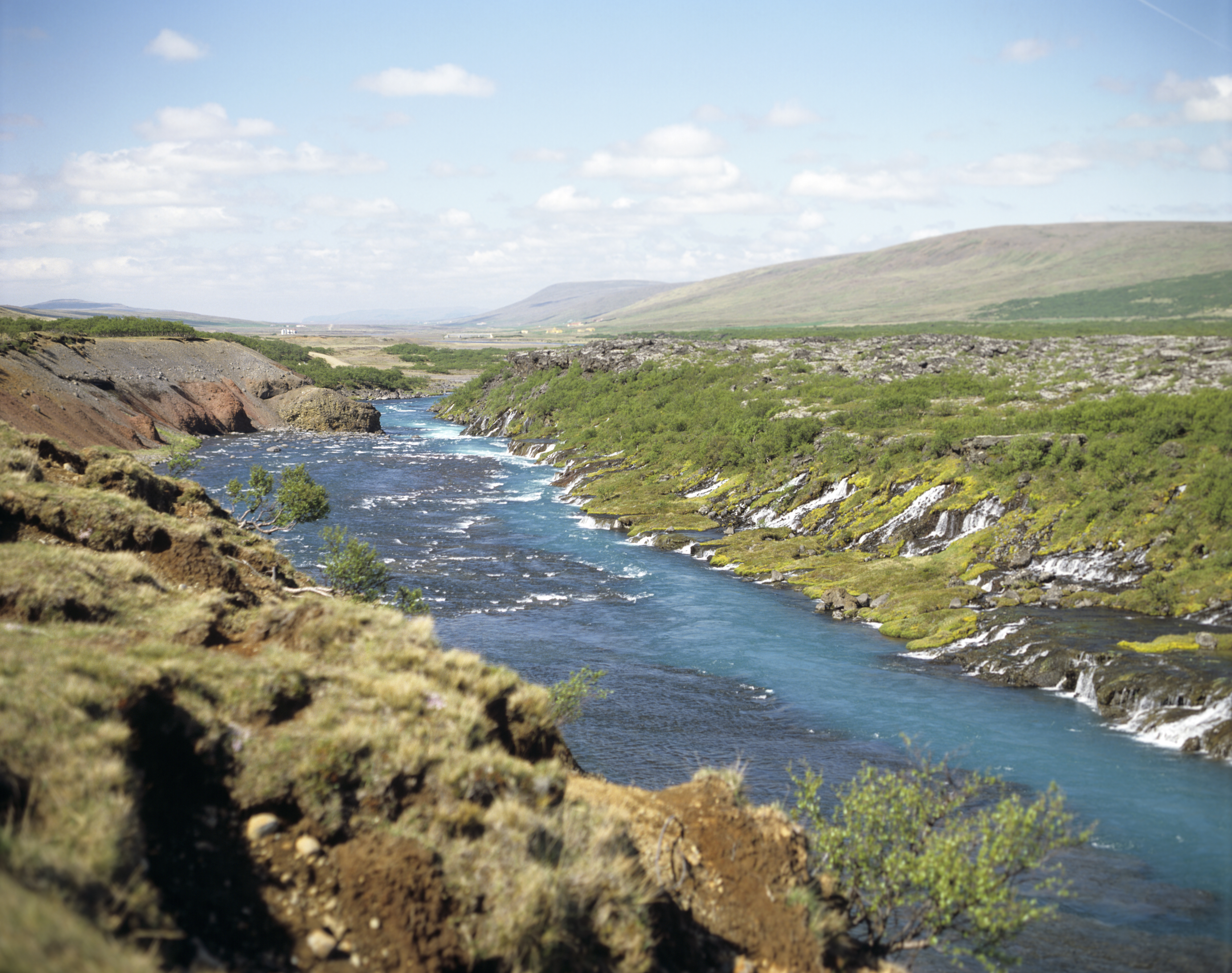 Hraunfossa östlich von Reeykholt.